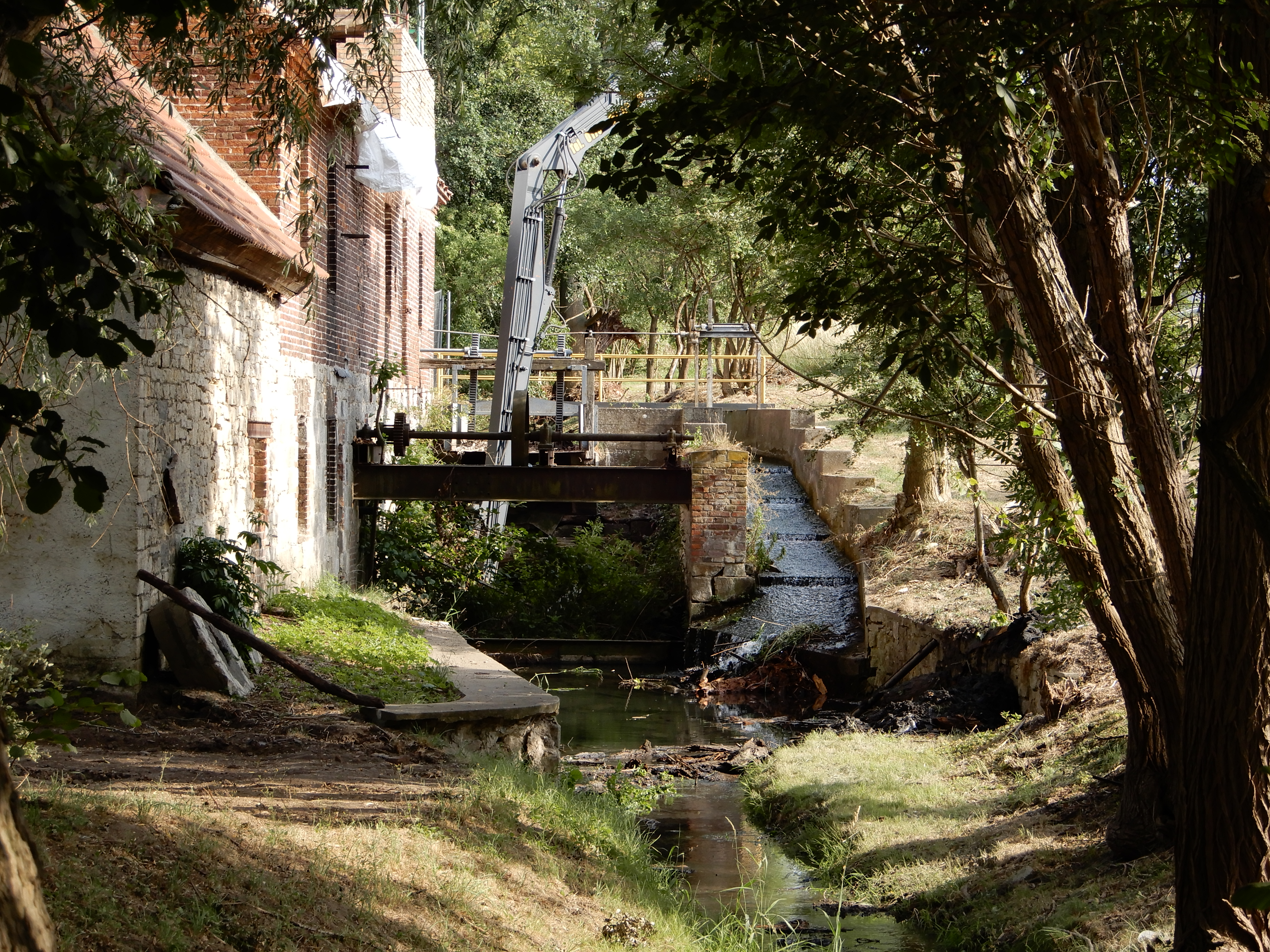 Fraubornmühle